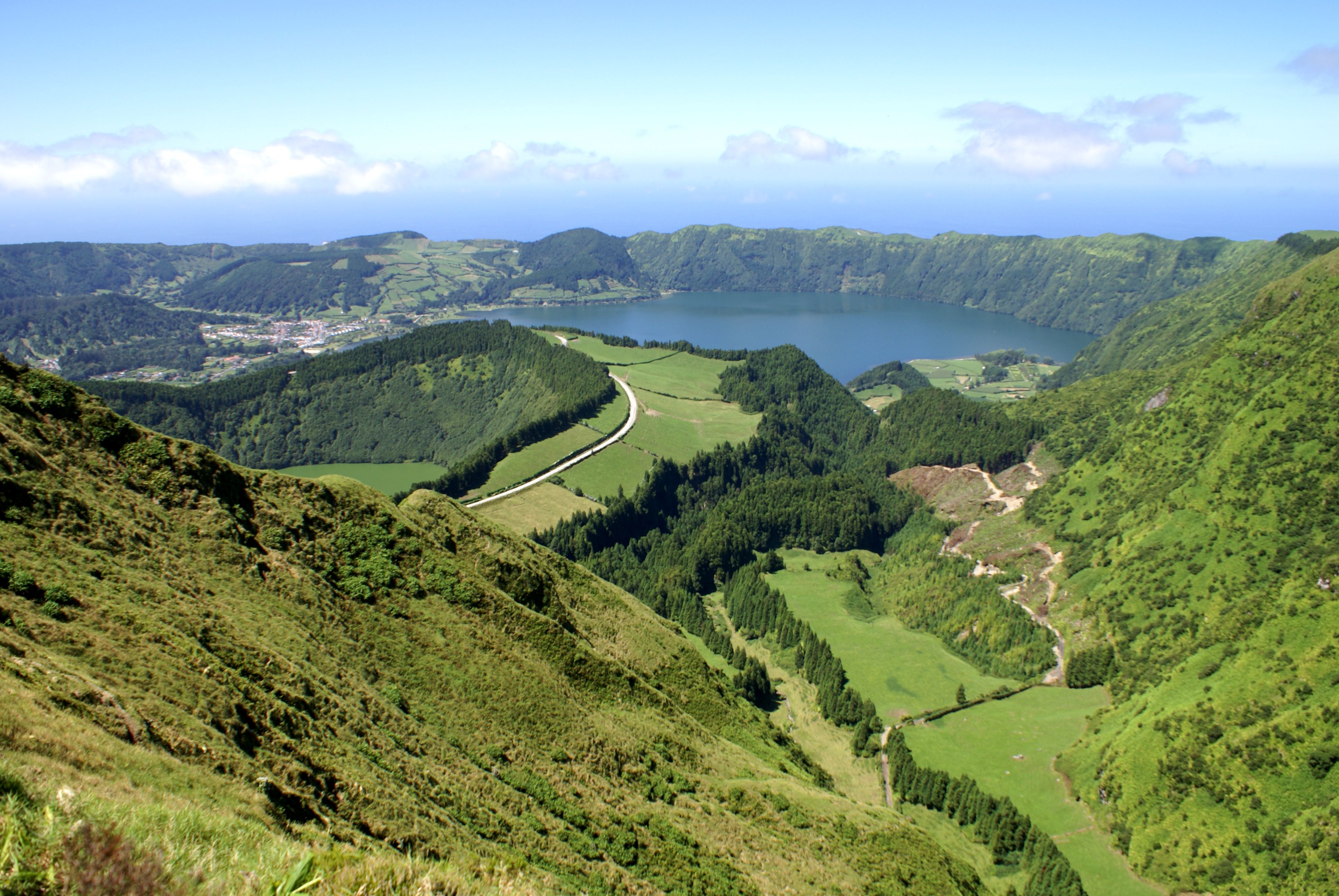 Miradouro da Boca do Inferno, Lagoa das Sete Cidades, ilha de São Miguel, Açores